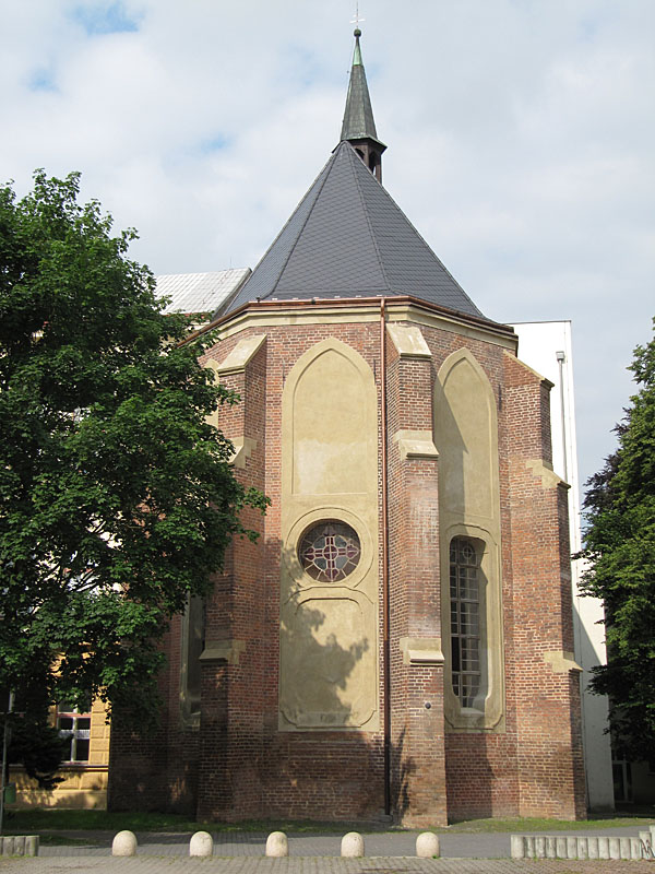 Kaple sv. Jana Nepomuckého (Nymburk)